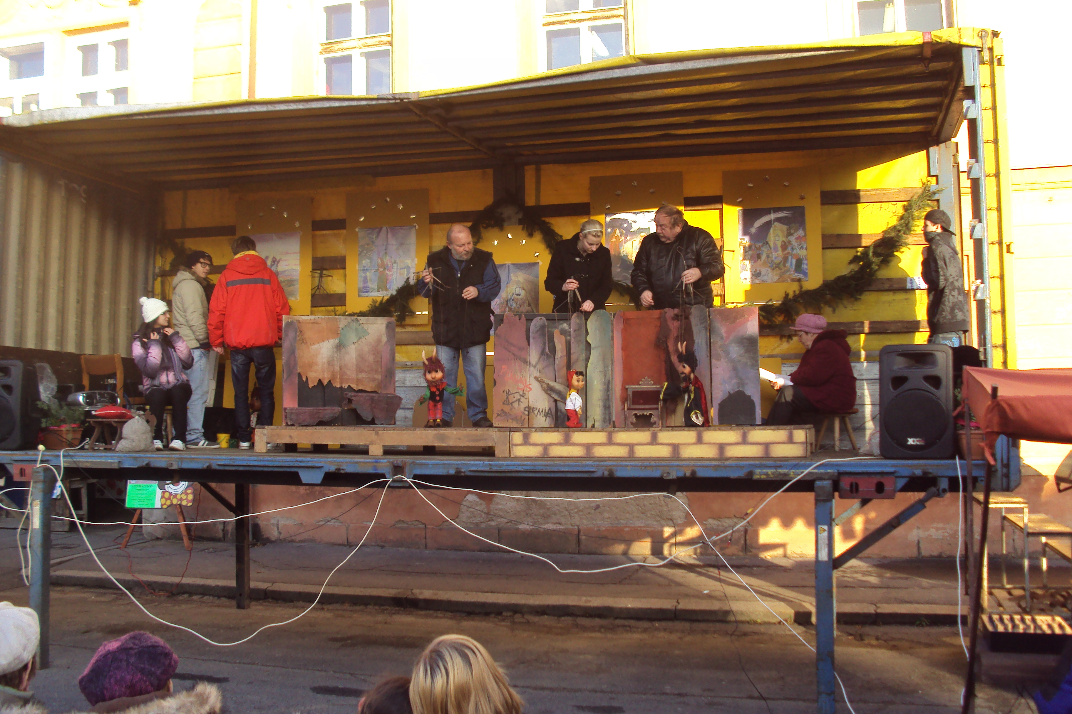 Loutkový soubor Klubíčko ze Cvikova, představení na náměstí v Zákupech, akce Zákupský advent